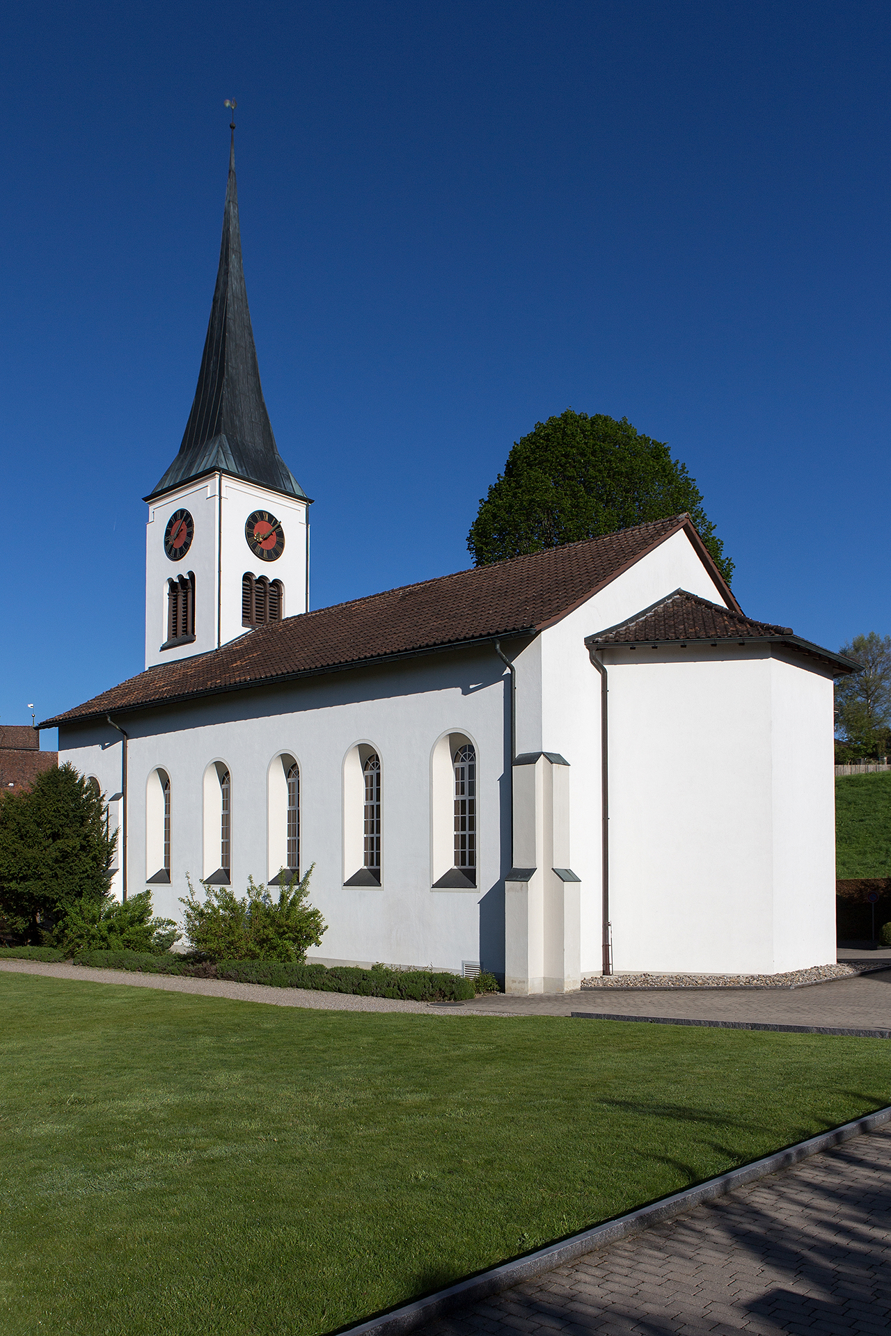 Evangelische Kirche in Hauptwil (TG)